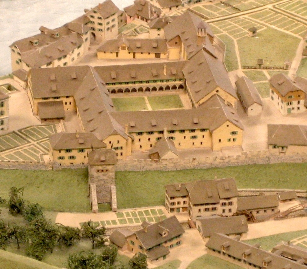 Kloster Oetenbach auf dem Stadtmodell von 1794; Blick nach Osten